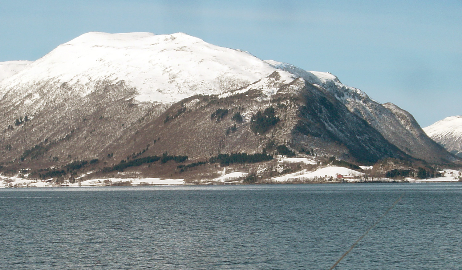 Gjemnes and Gjemnes